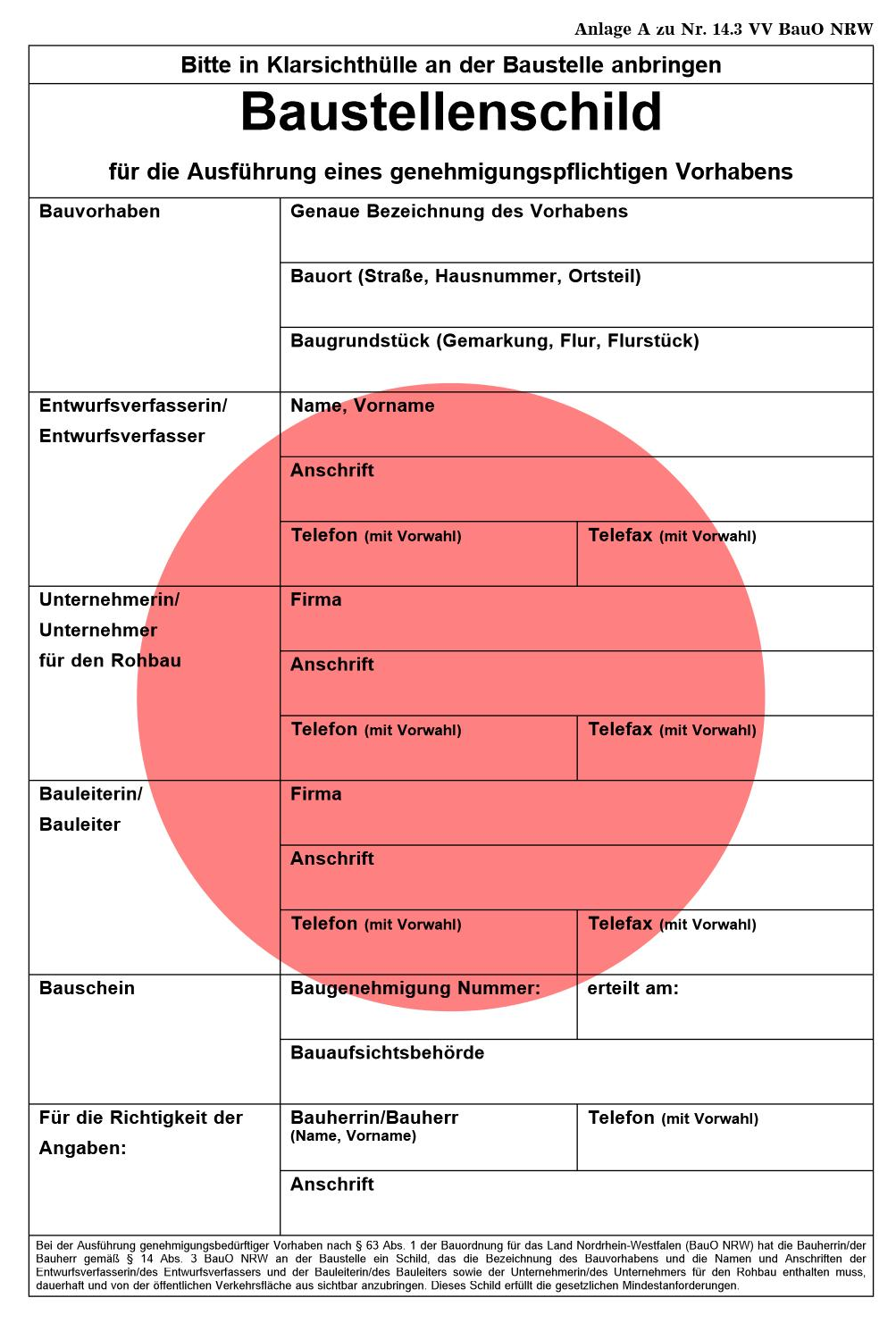 Baustellenschild (rot) für das Land NRW für genehmigungspflichtige Bauarbeiten